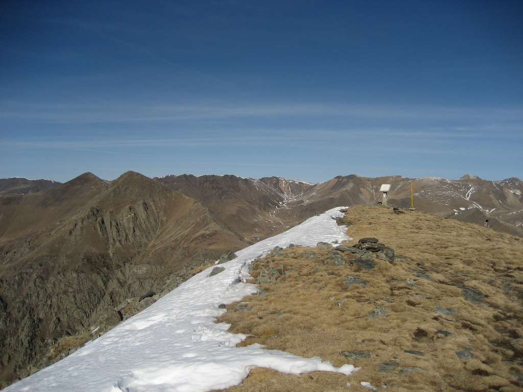 Pic del Balandrau, el Ripollès, Catalunya.